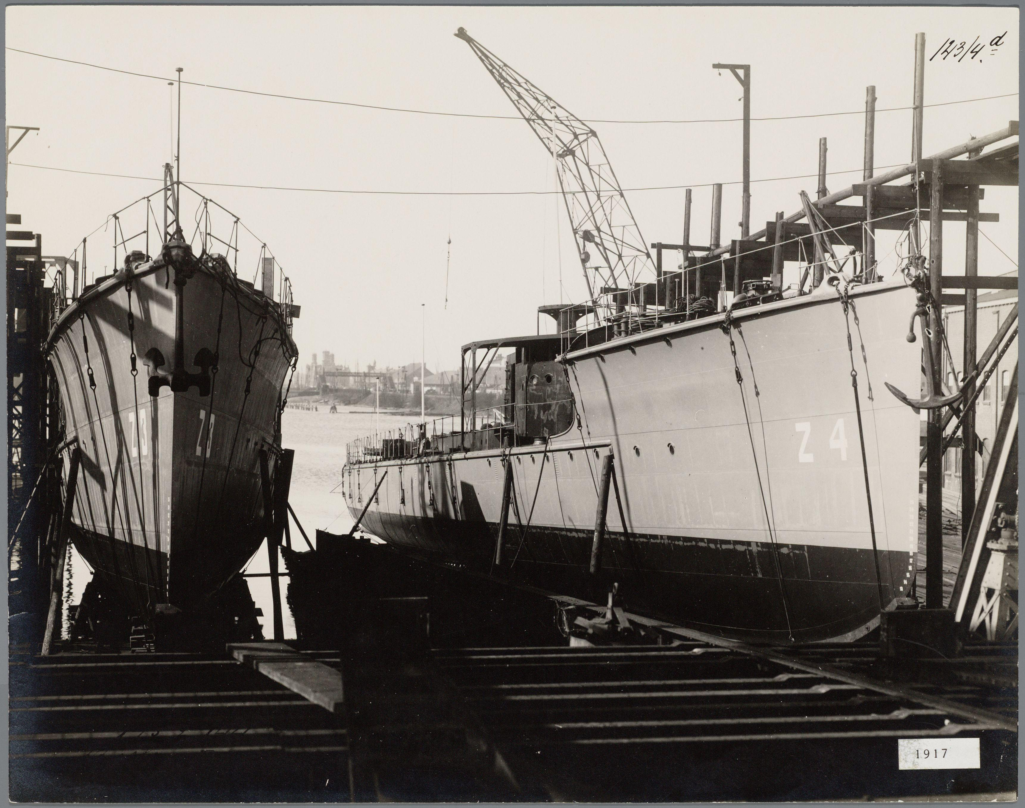 Beschrijving Gelijktijdige tewaterlating van de torpedoboten Hr. Ms. Z 3 (links) en Hr. Ms. Z 4 (rechts) Bouwnummers 143 en 144, gebouwd op de werf van de Nederlandsche Scheepsbouw Maatschappij (N.S.M.), Conradstraat 151, in opdracht van de Koninklijke Nederlandsche Marine. Documenttype foto Vervaardiger Oosterhuis, Gustaaf (1858-1938) Collectie Archief Nederlandse Dok- en Scheepsbouw Mij.: foto's Datering 23 maart 1917 Geografische naam Dijksgracht Conradstraat Inventarissen Afbeeldingsbestand 010179000211 Generated with Dememorixer